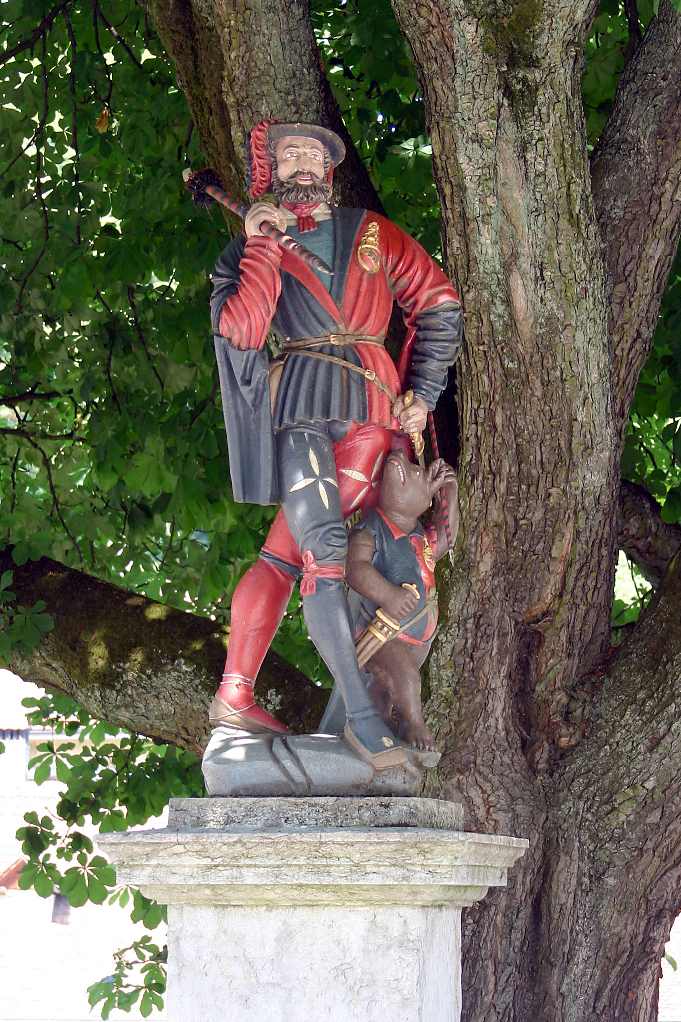 Läuferbrunnen, Bern, Switzerland